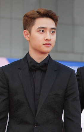 2017 부천국제판타스틱영화제(BIFAN) 레드카펫